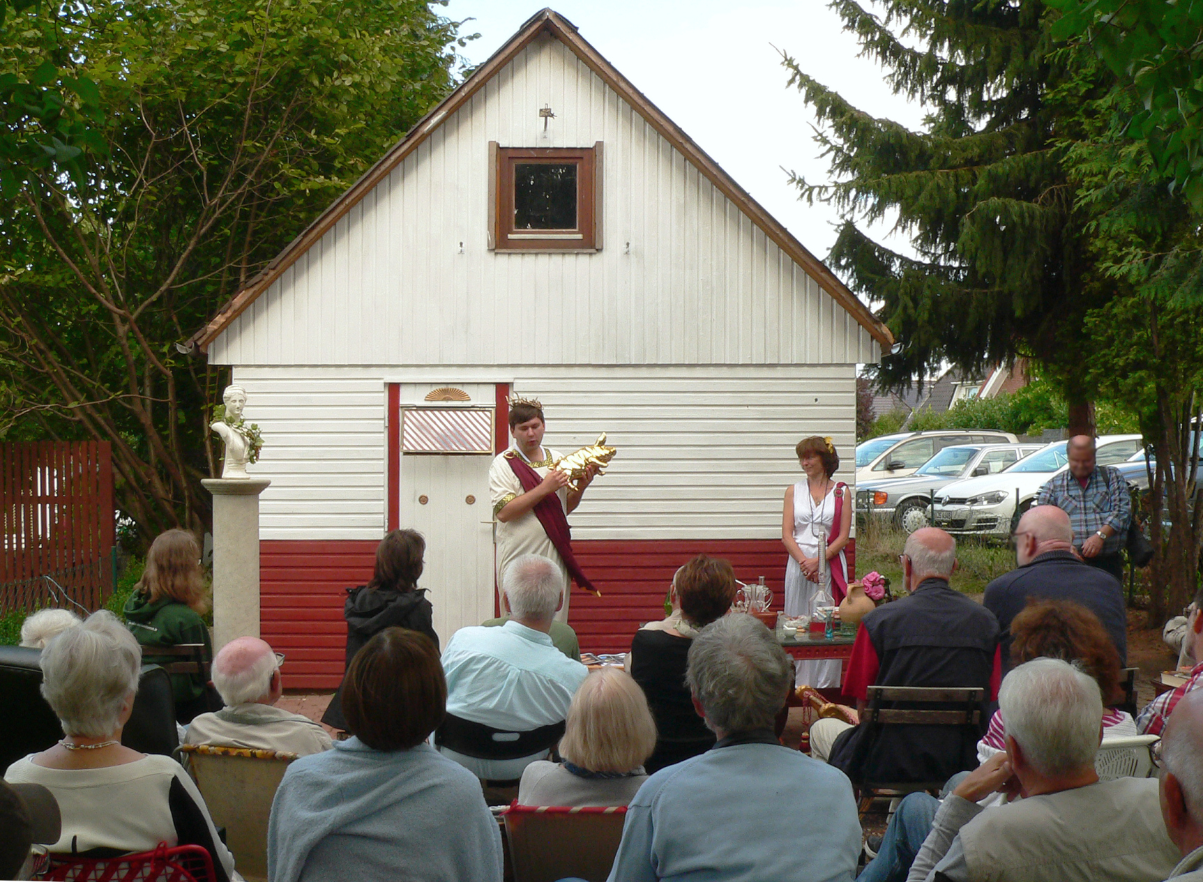 Informationscenter der Römer AG Leine (RAGL) am Rande des Marschlagers in einem Kleingartengelände, Vortrag zum Thema römischer Wein